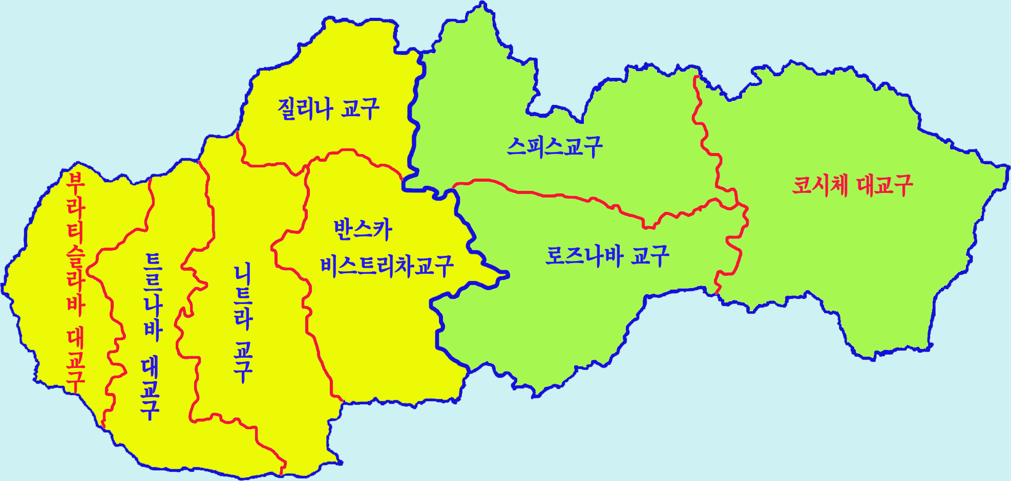 슬로바키아 로마가톨릭 교구도